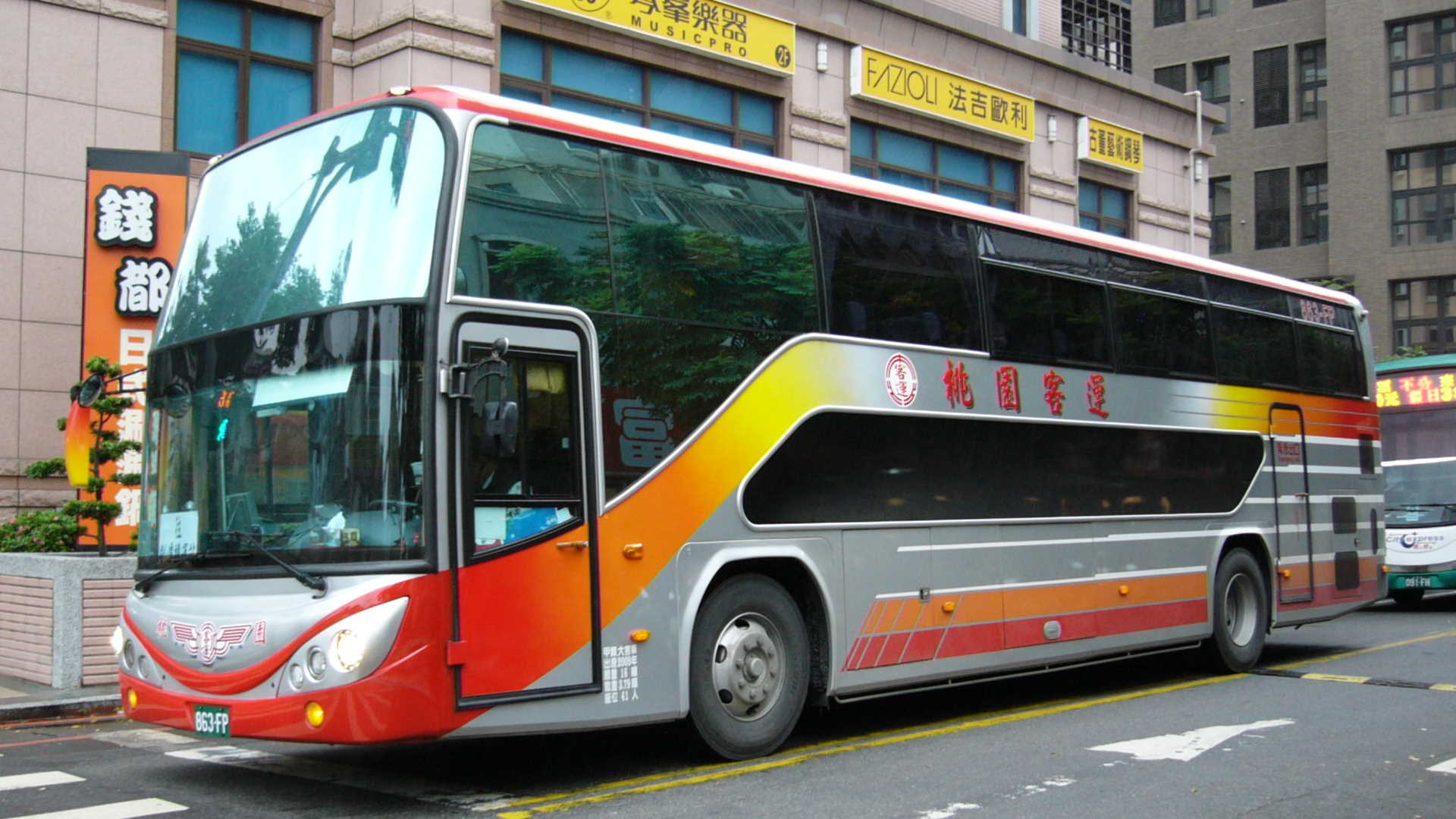 桃園客運863-FP左前方外觀